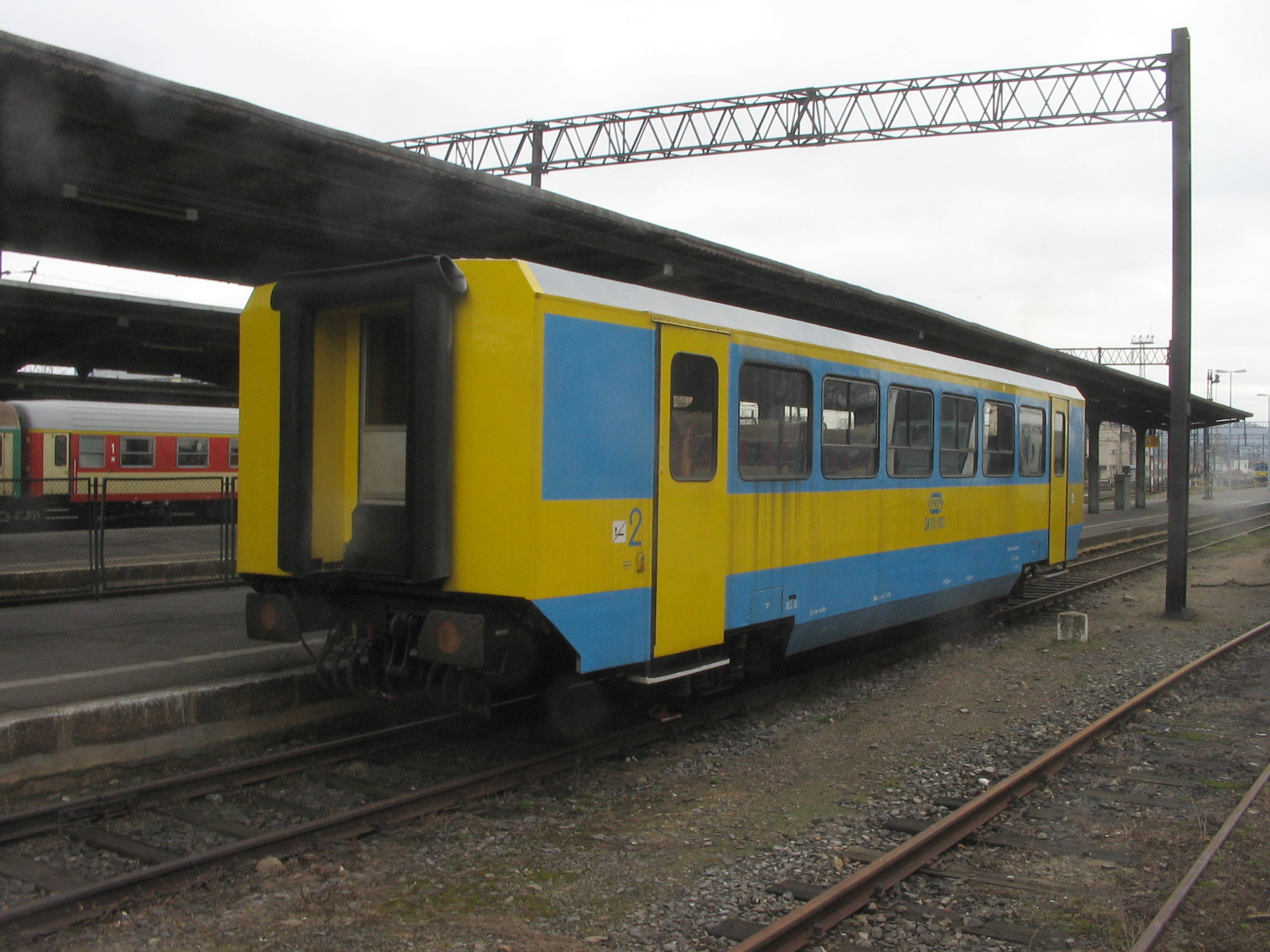 SA111-001 - widok z ukosa , stacja Jelenia Góra